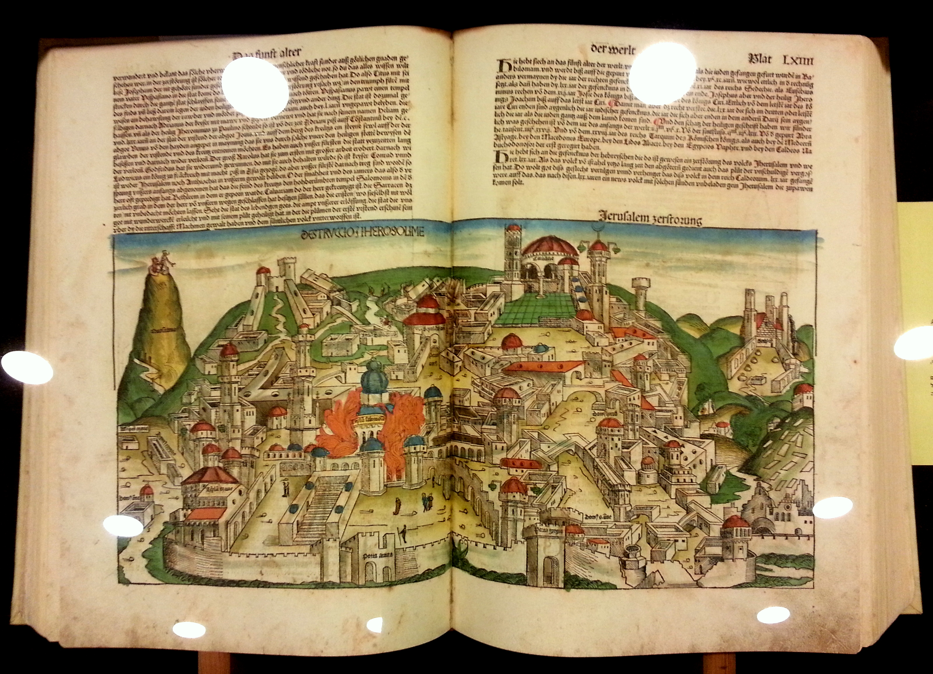 ציור של העיר ירושלים בכרוניקה של שדל. הרטמן שדל Hartmann Schedel נולד ב-13 בפברואר 1440 - נפטר ב-28 בנובמבר 1514 היה רופא גרמני יליד נירנברג, היסטוריון, הומניסט ואחד הקרטוגרפים הראשונים שהשתמשו בדפוס הוא כתב את המלל ל"כרוניקה של העולם מאת שדל" שראה אור בשנת 1493 בנירנברג. על פי שלט בספריית הר הצופים למדעי הרוח והחברה של האוניברסיטה העברית בירושלים: "בכרוניקה הופיעו מפות ואיורים הנחשבים לאיורים הראשונים אי פעם של ערים ומדינות רבות"